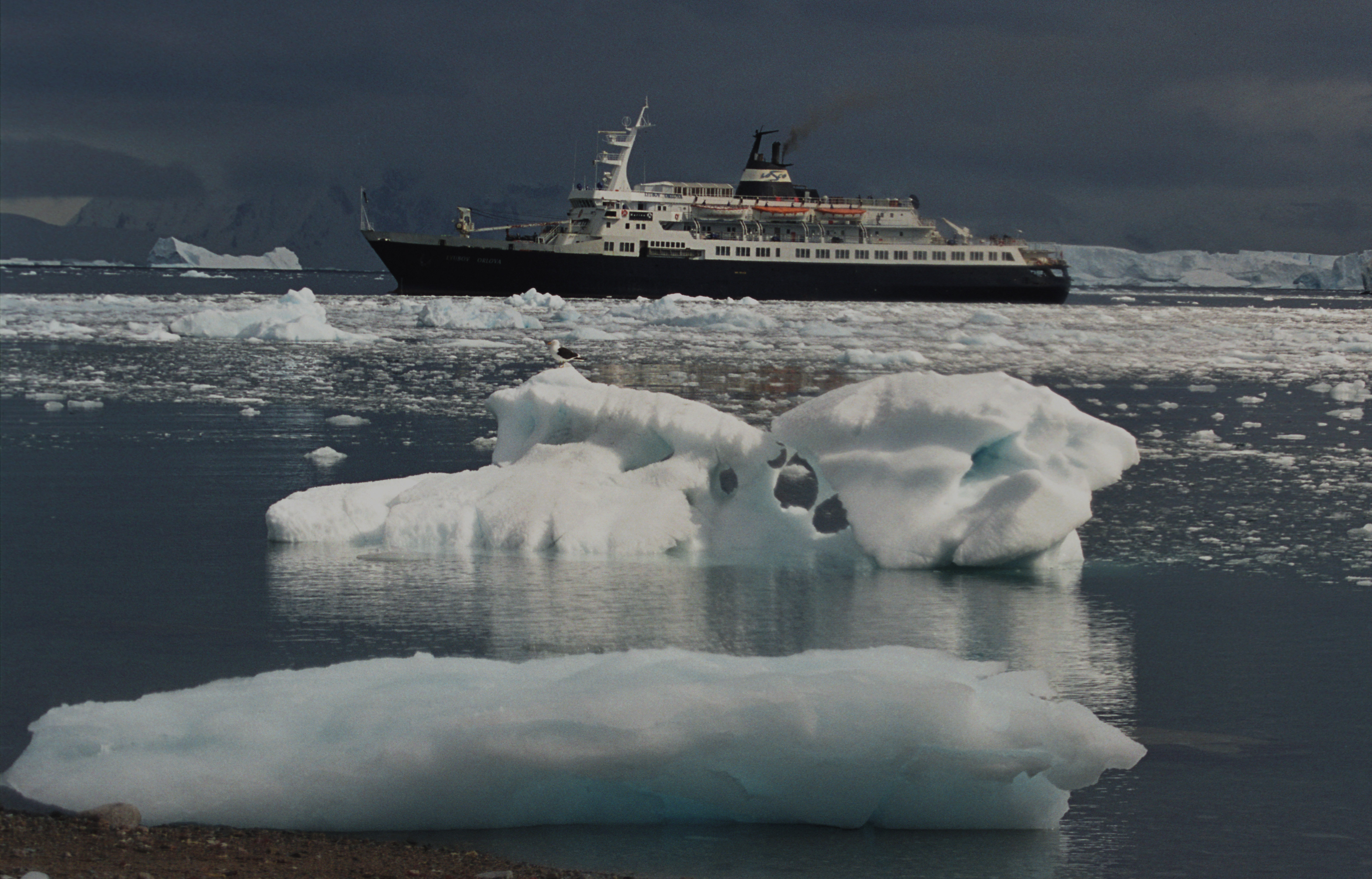 M/V Lyubov Orlova in Neko Harbour, Antarctica